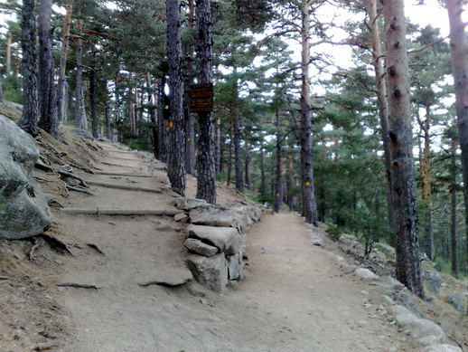 Camino Schmidt- Desvío Senda de los Cospes.